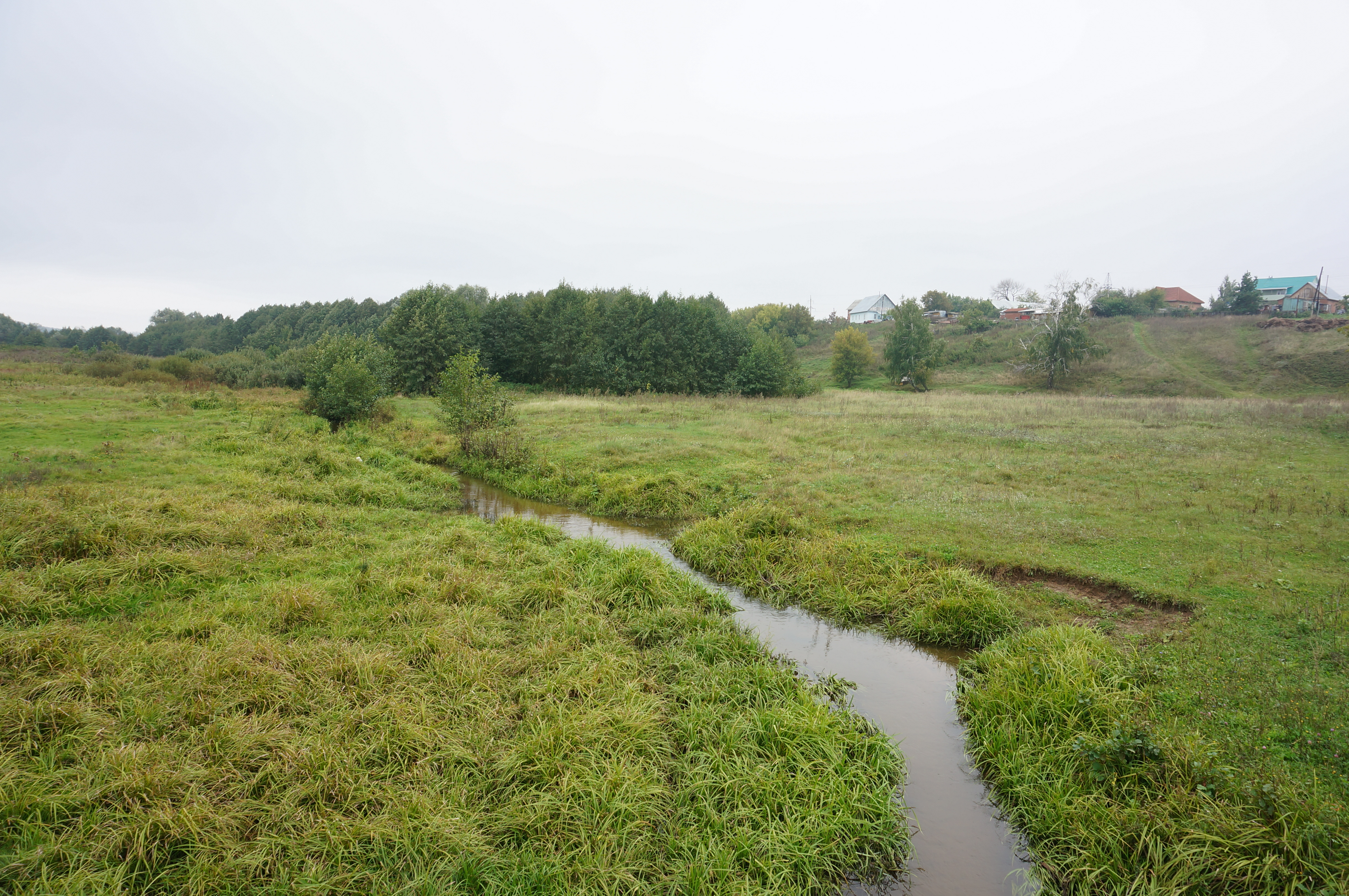 Река Ташёлка в районе села Ташла, Ставропольский район Самарской области, Россия